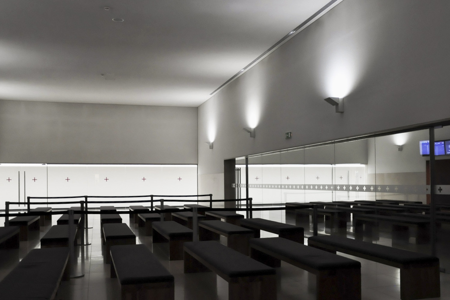 Capela do Sagrado Coracao de Jesus